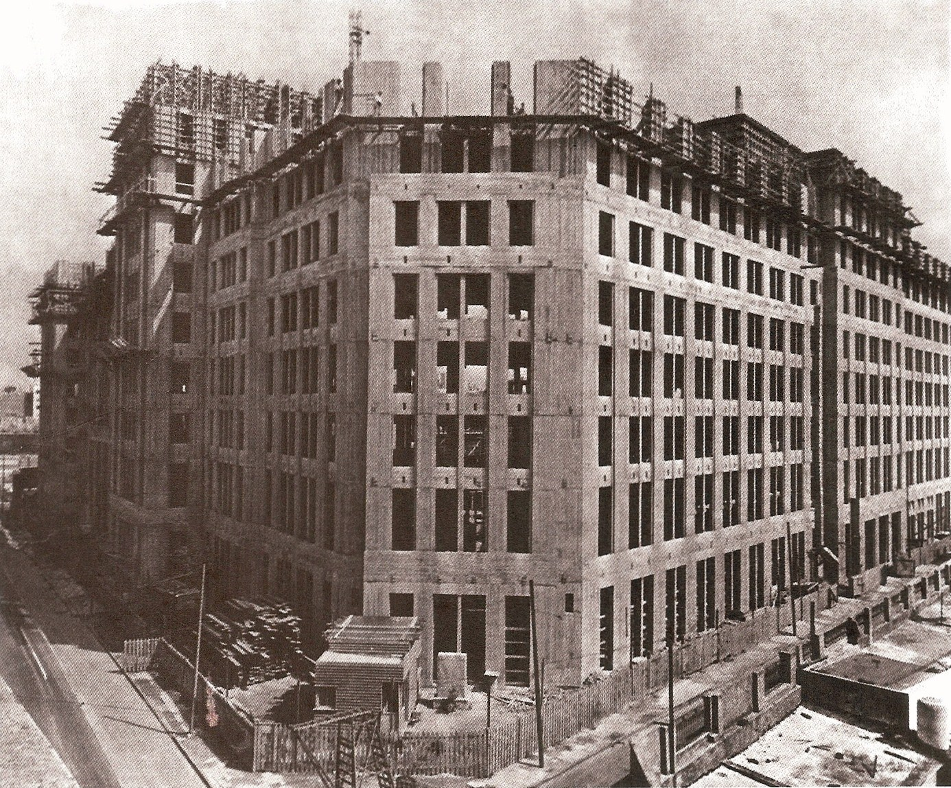 Construcción del edificio de la Facultad de Medicina de la Universidad de Buenos Aires. Obra del arquitecto Ramón Sammartino, ganador de un concurso de proyectos realizado en 1936. El edificio fue inaugurado en 1944, frente a la actual Plaza Houssay.